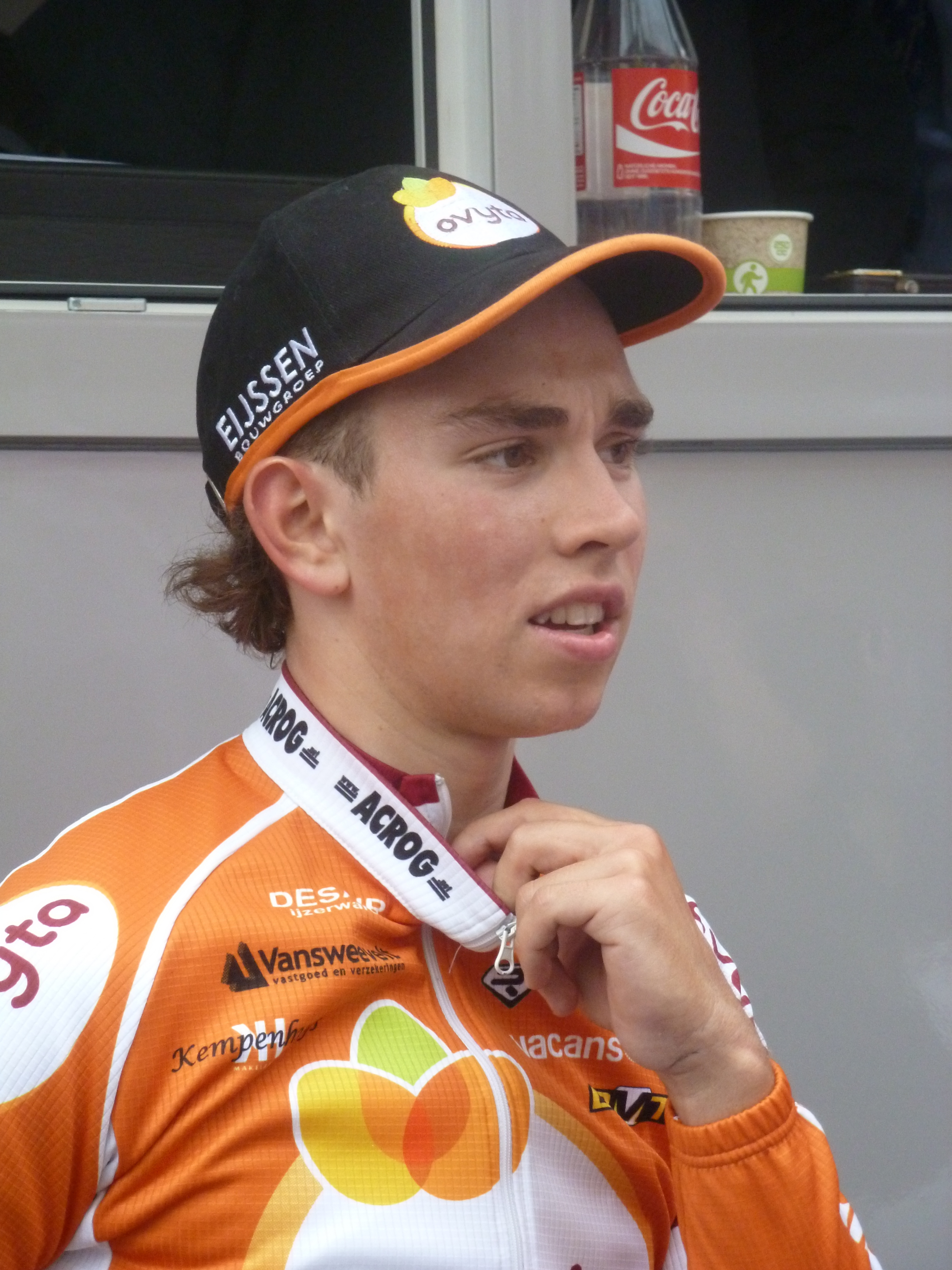 Sean De Bie, belgischer Radrennfahrer